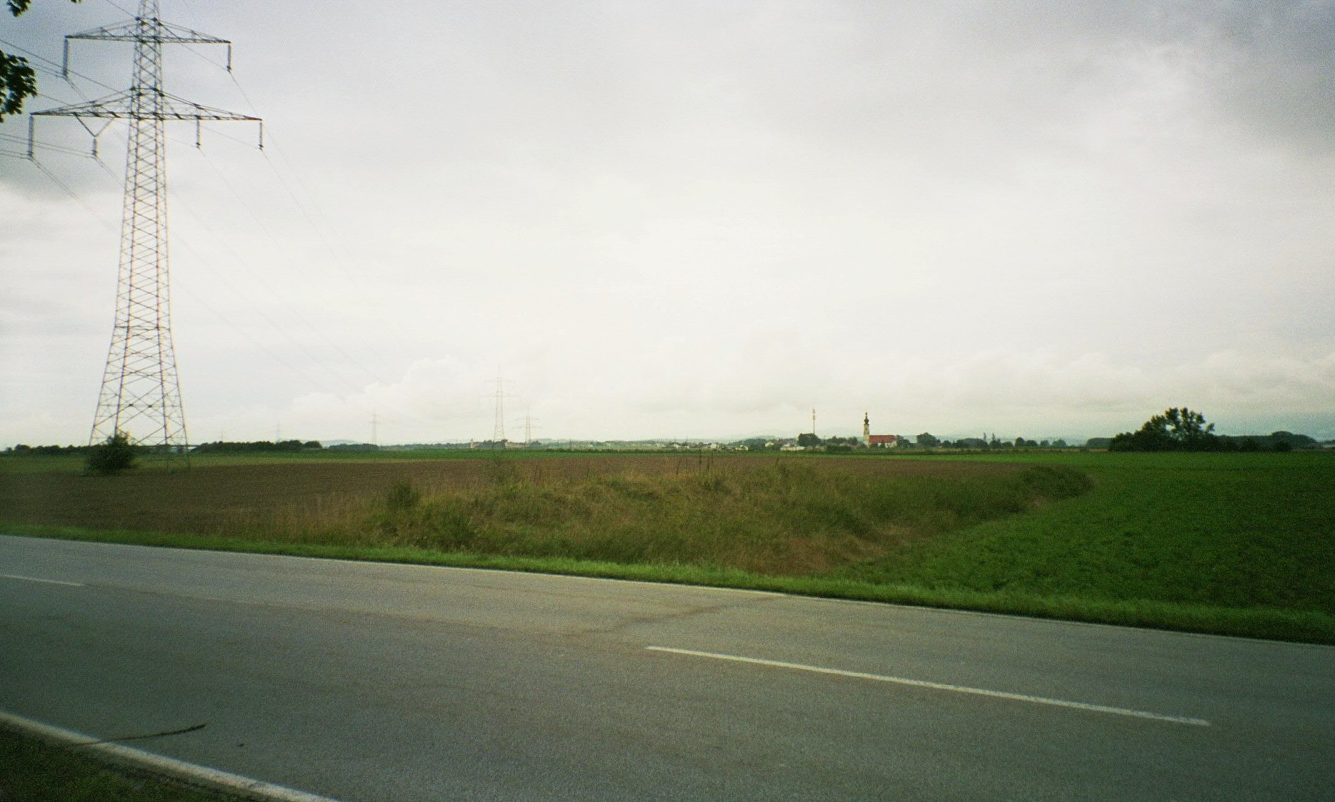 Keltenschanze bei Loh an der B8